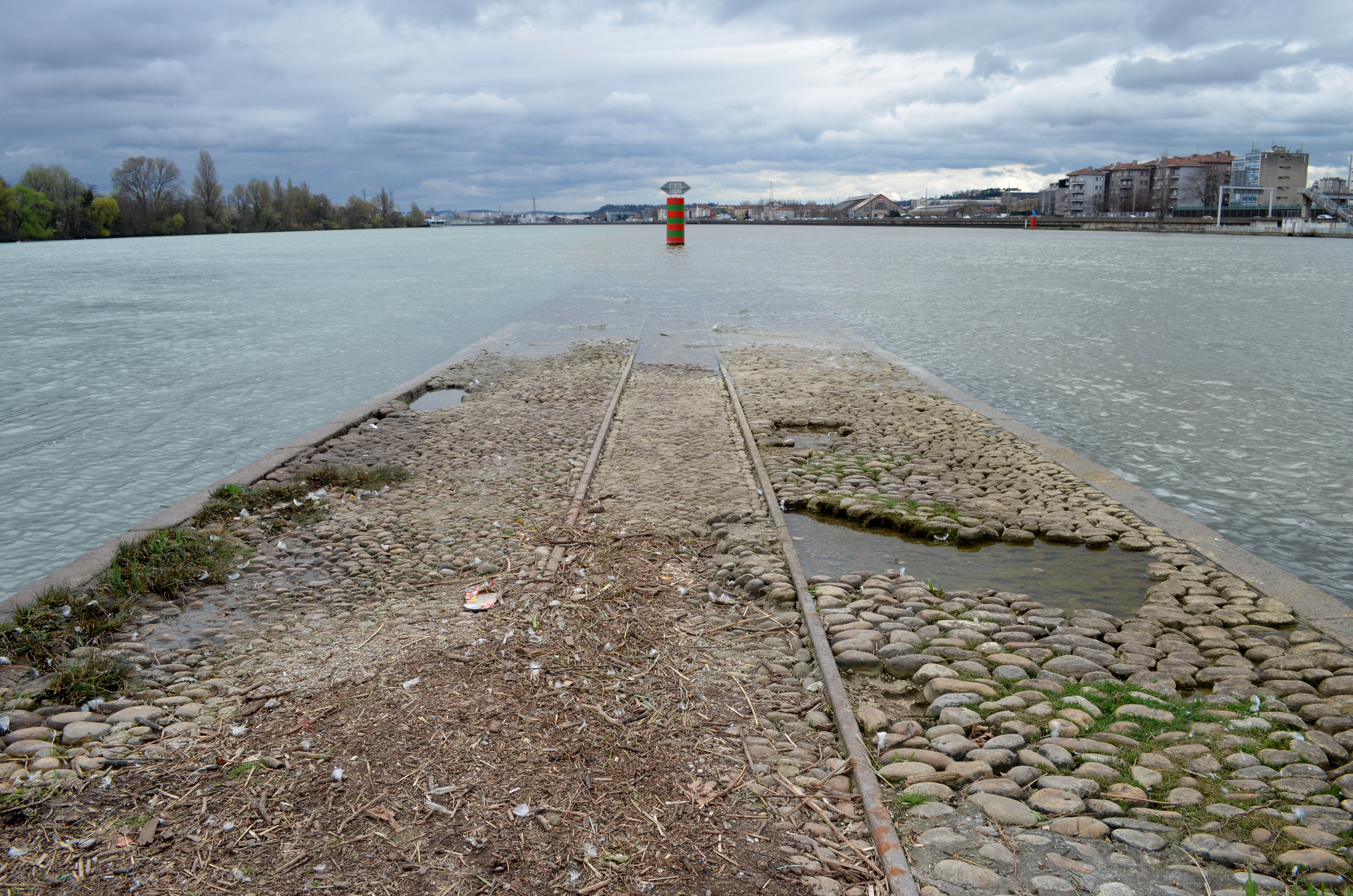 La confluence Rhône-Saône à Lyon et les rails...